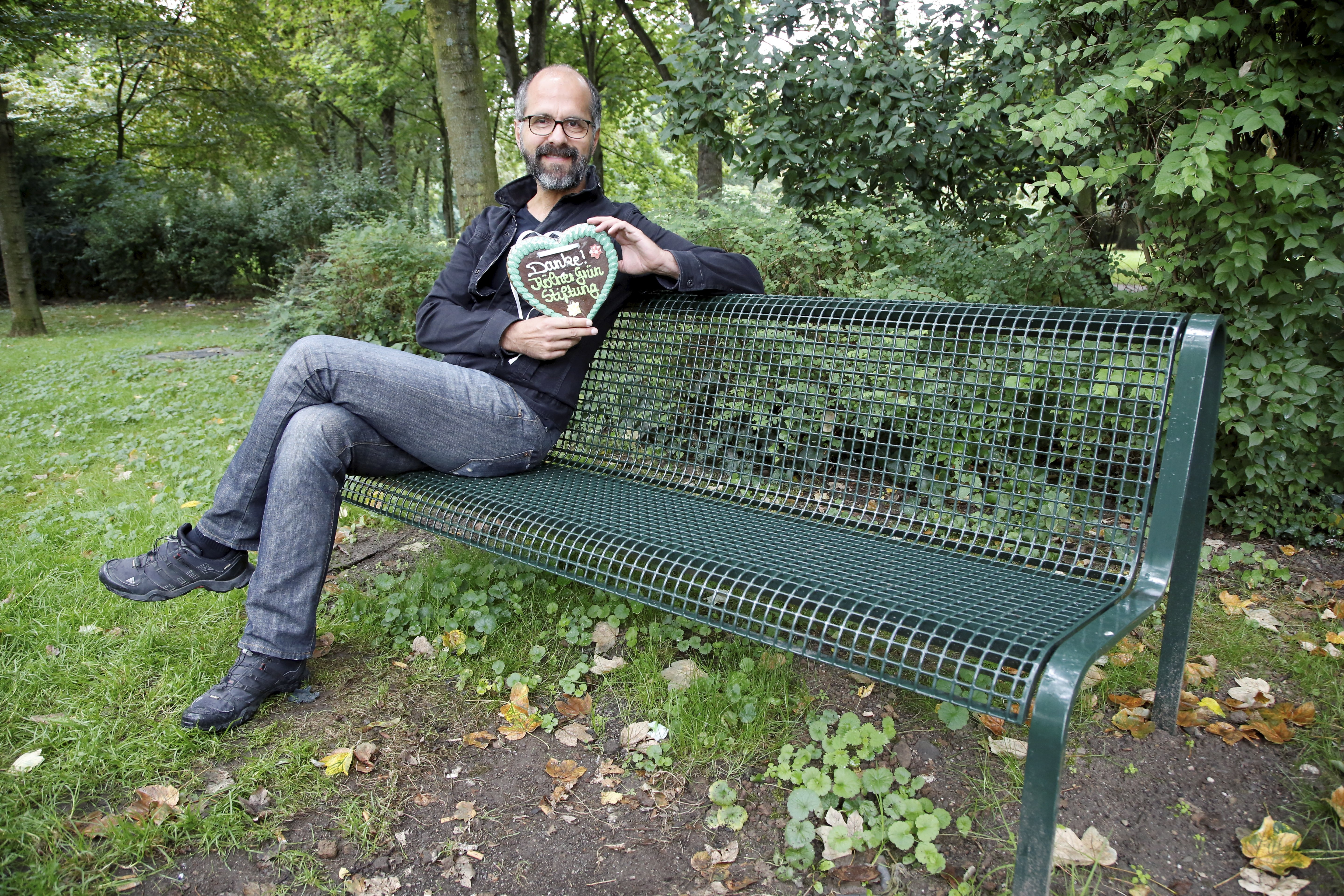 Christoph Maria Herbst spendete Bank bei der Kölner Grün Stiftung und kann es sich nun auf seiner eigenen Bank bequem machen.